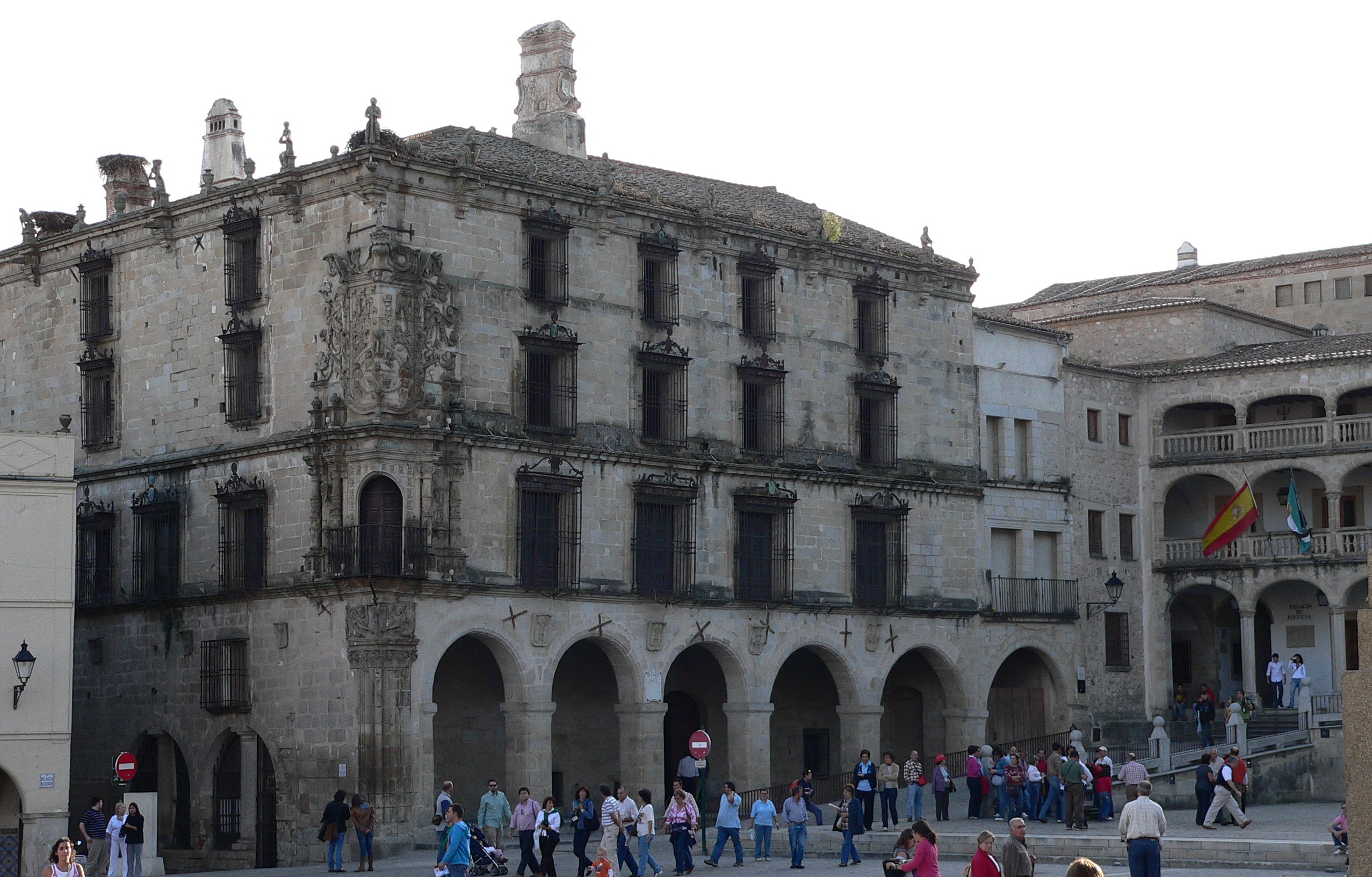 Descripción: Palacio de la Conquista Lugar: Plaza Mayor Ciudad : Trujillo País : España Fotógrafo: © Manuel González Olaechea y Franco Fecha de la foto : 12 de octubre de 2007